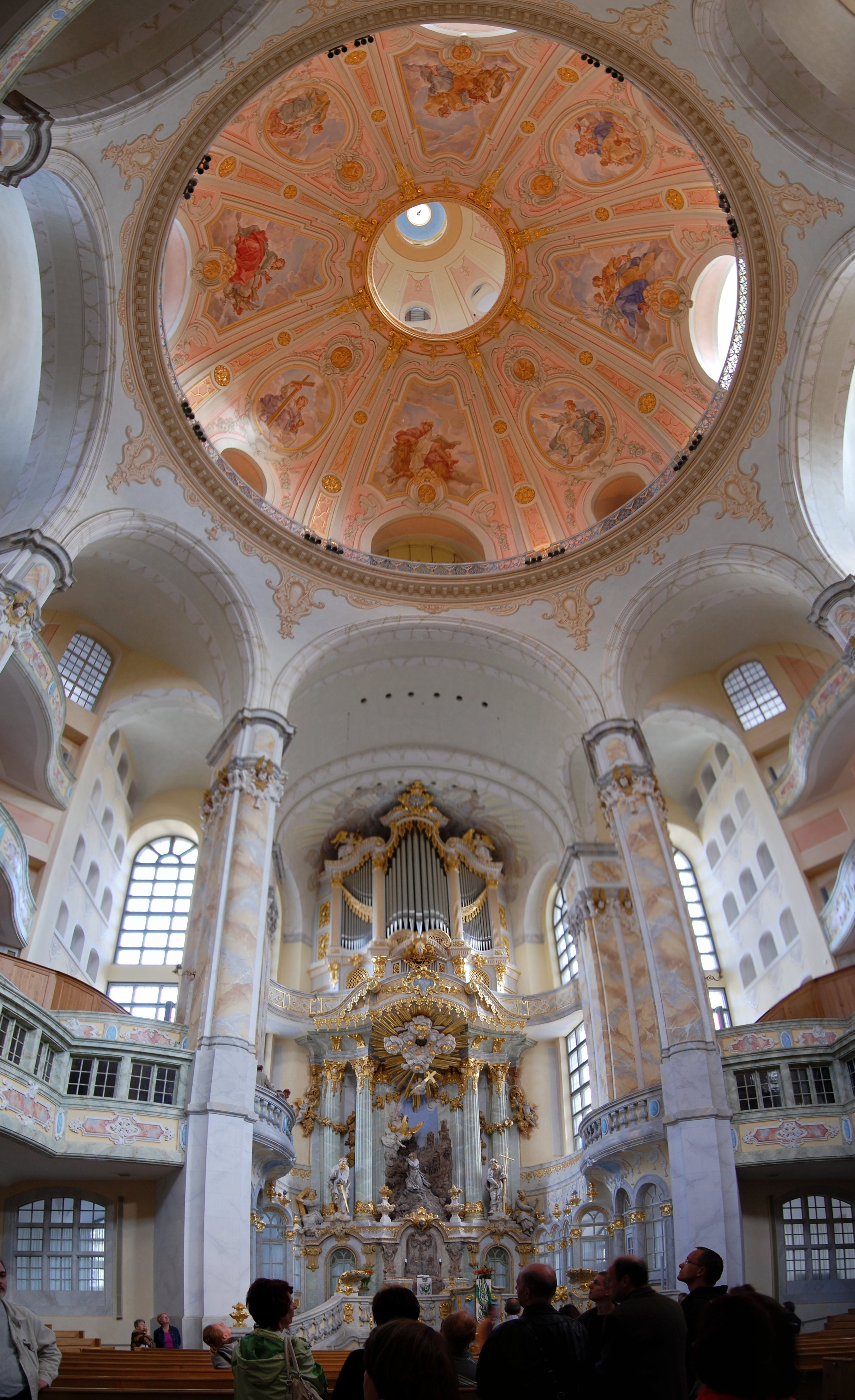 Frauenkirche Dresden, Orgel und Kuppel